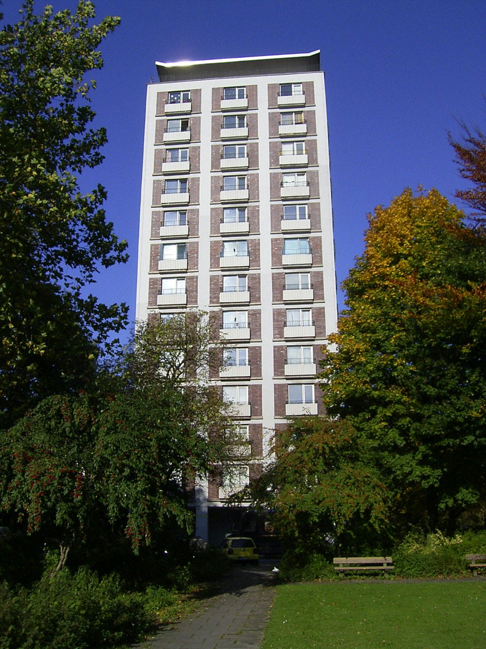 Das Hochhaus am Habichtsplatz 8 in Barmbek-Nord wurde 1955 von der Neuen Heimat errichtet. Es dokumentiert den Neuanfang des Städtebaus mit solitären Punkthäusern.